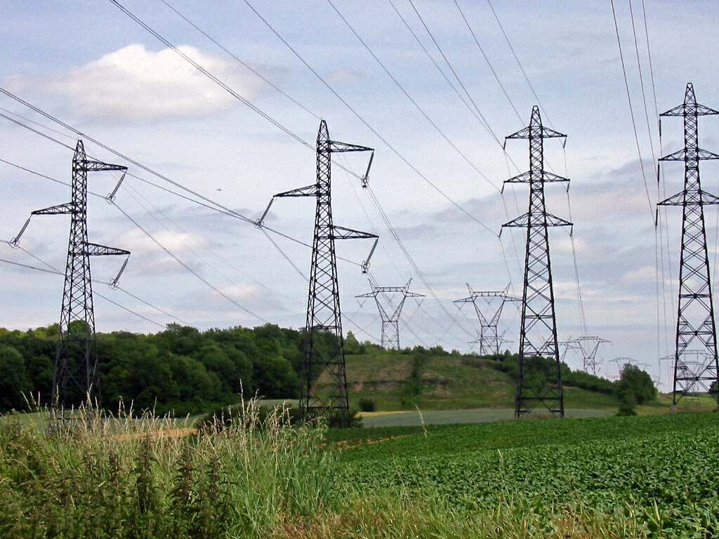 Lignes à haute tension (Sagy, Val d'Oise), France